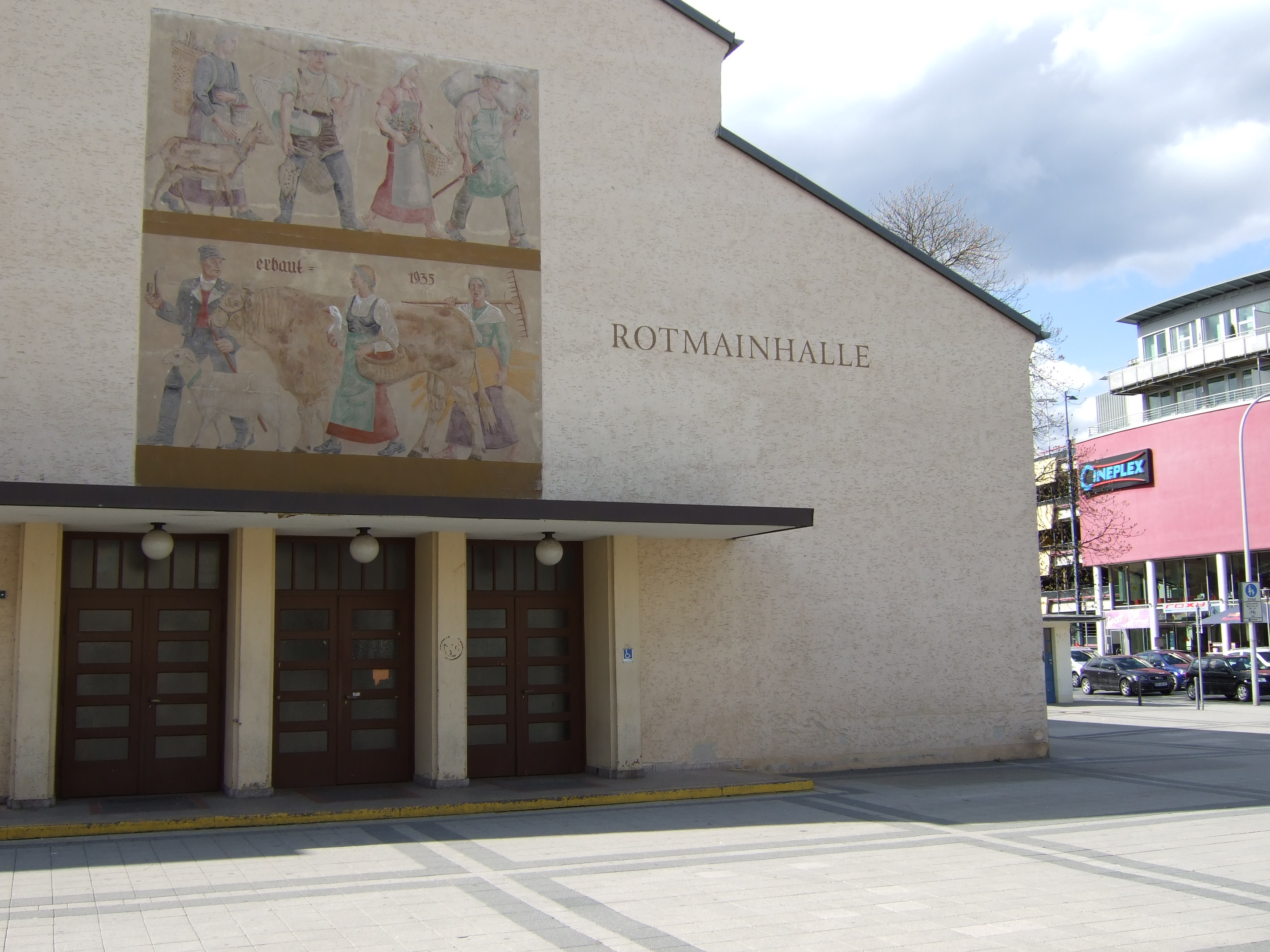 Rotmainhalle BayreuthThis is a photograph of an architectural monument.